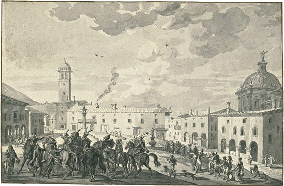 Bonaparte arrive à Lonato et apprend que la garnison est sommée de se rendre